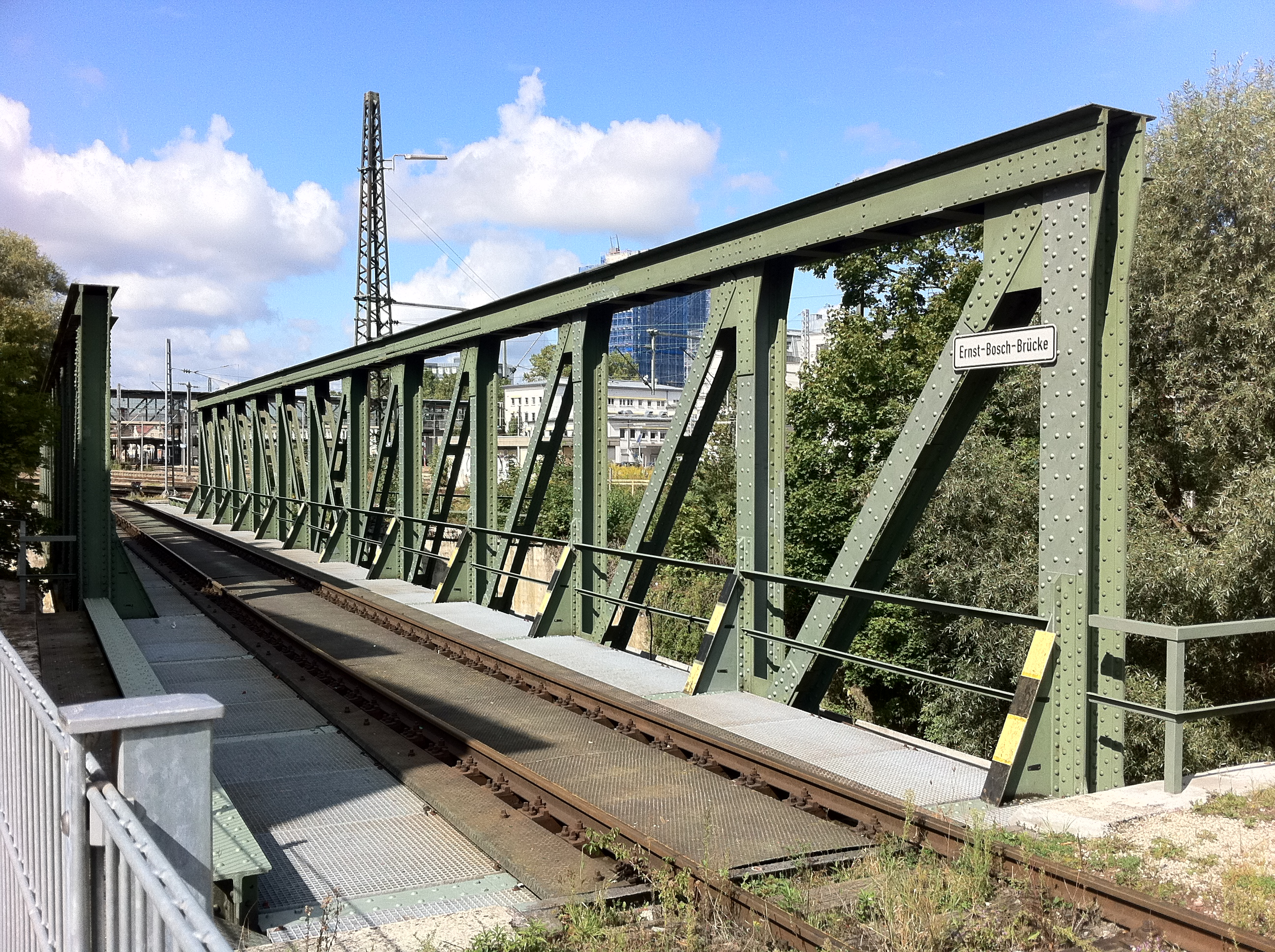 Gleisanschluss Schrottplatz Bahnhof GP